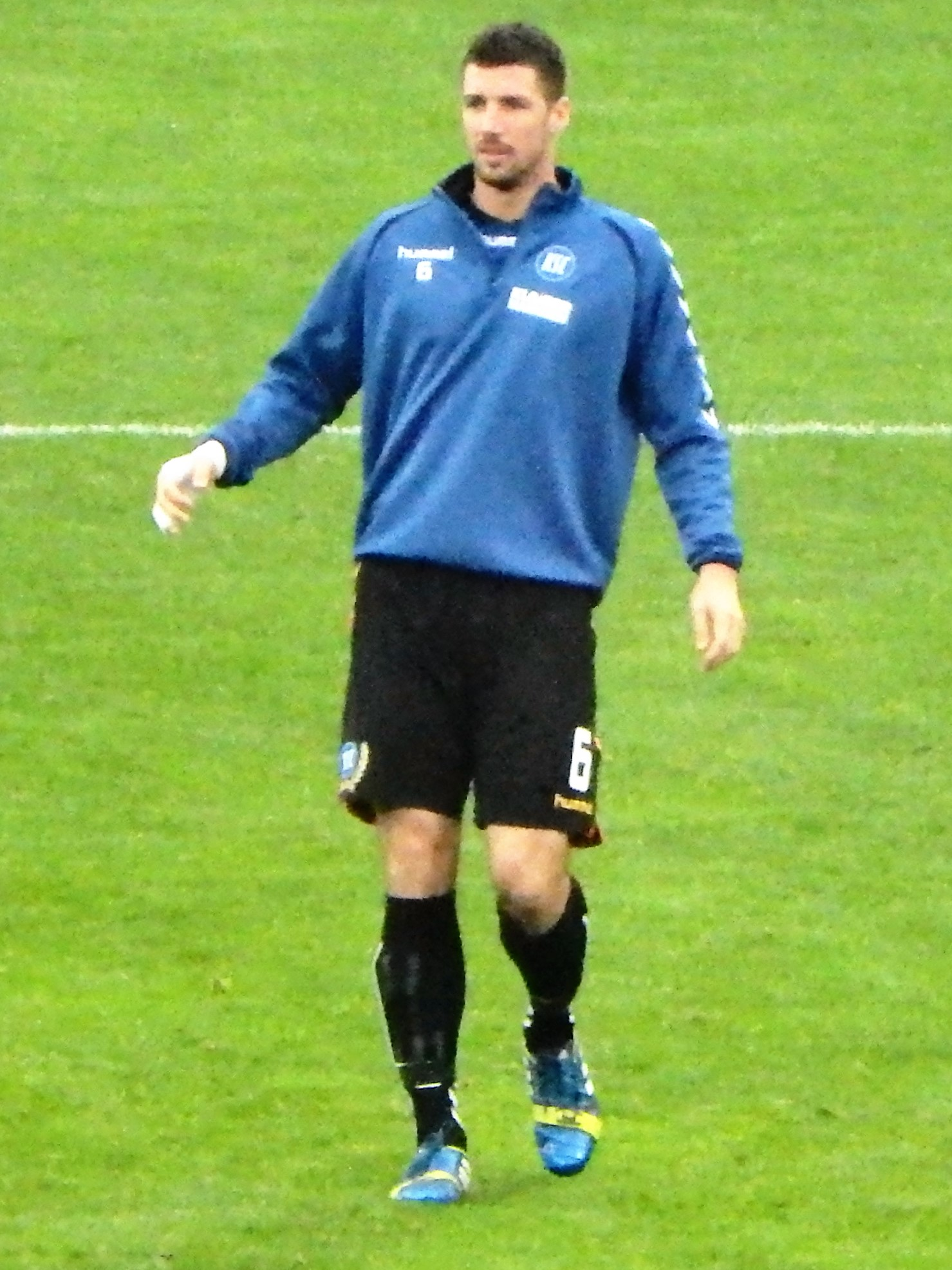 Mauersberger, Jan KSC 14-15